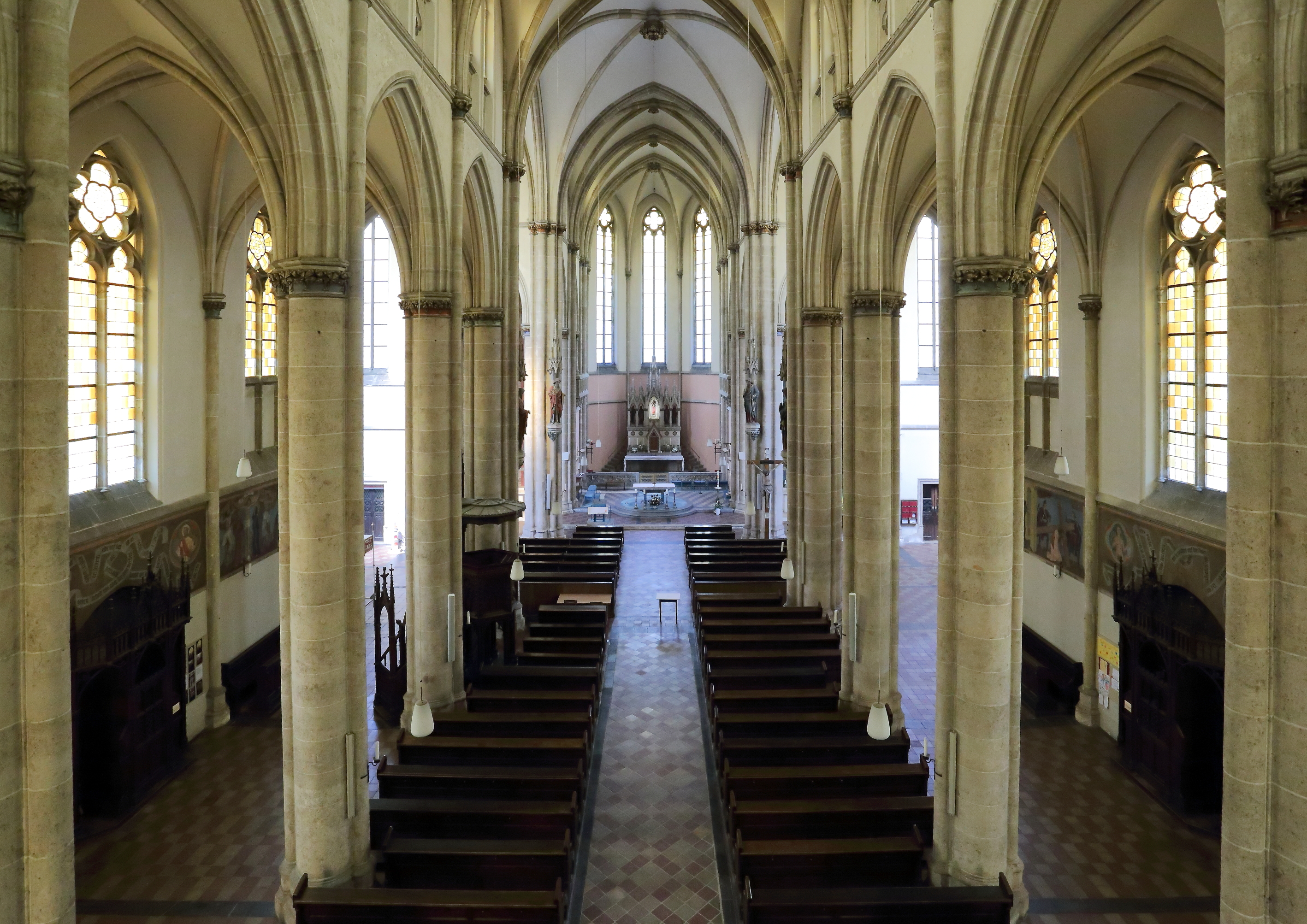 Blick von der Orgelempore der Othmarkirche im 3. Wiener Gemeindebezirk in Richtung Presbyterium.